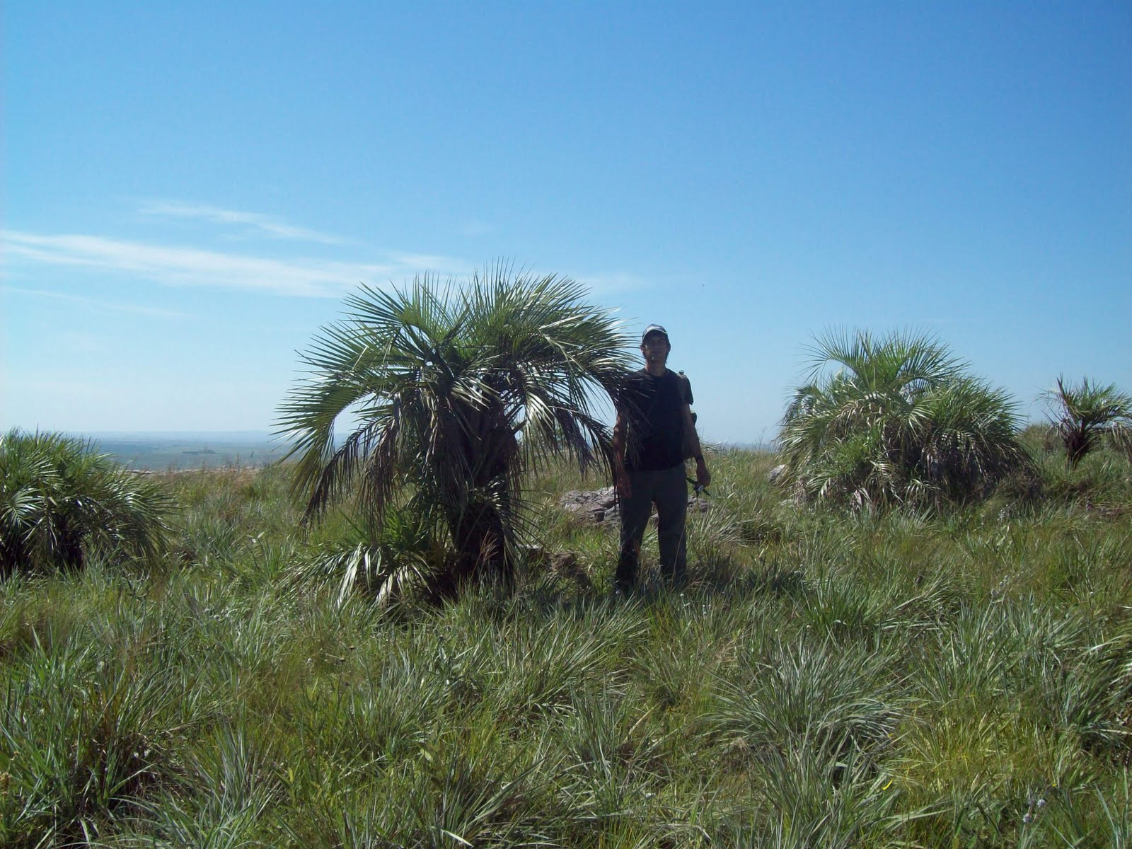 Butia paraguayensis. Arecaceae. Fotos tomadas en cima y ladera del Cerro Miriñaque entre rocas y gramíneas, departamento de Rivera, Uruguay.